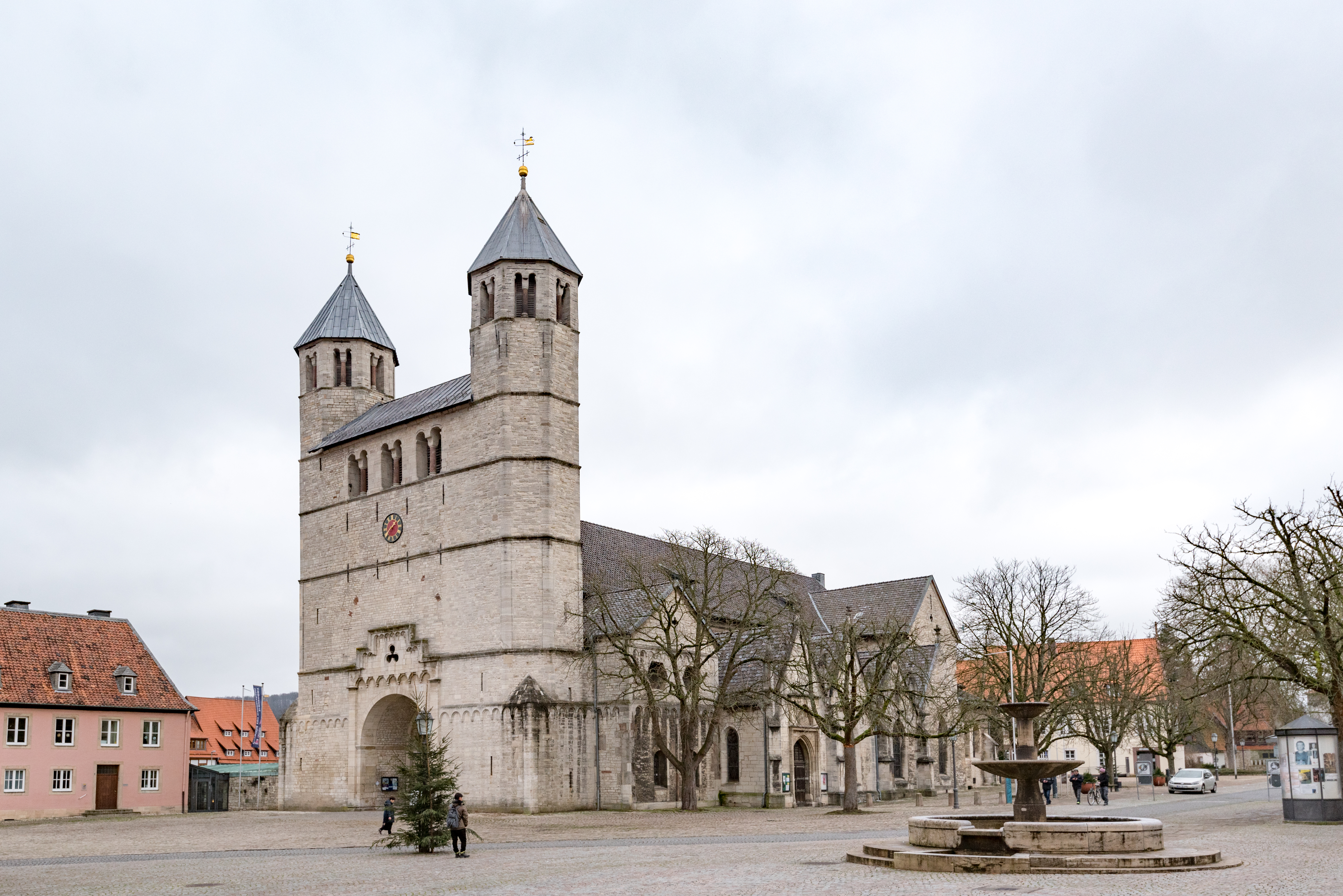 Bad Gandersheim, Stiftsfreiheit 1, Stiftskirche